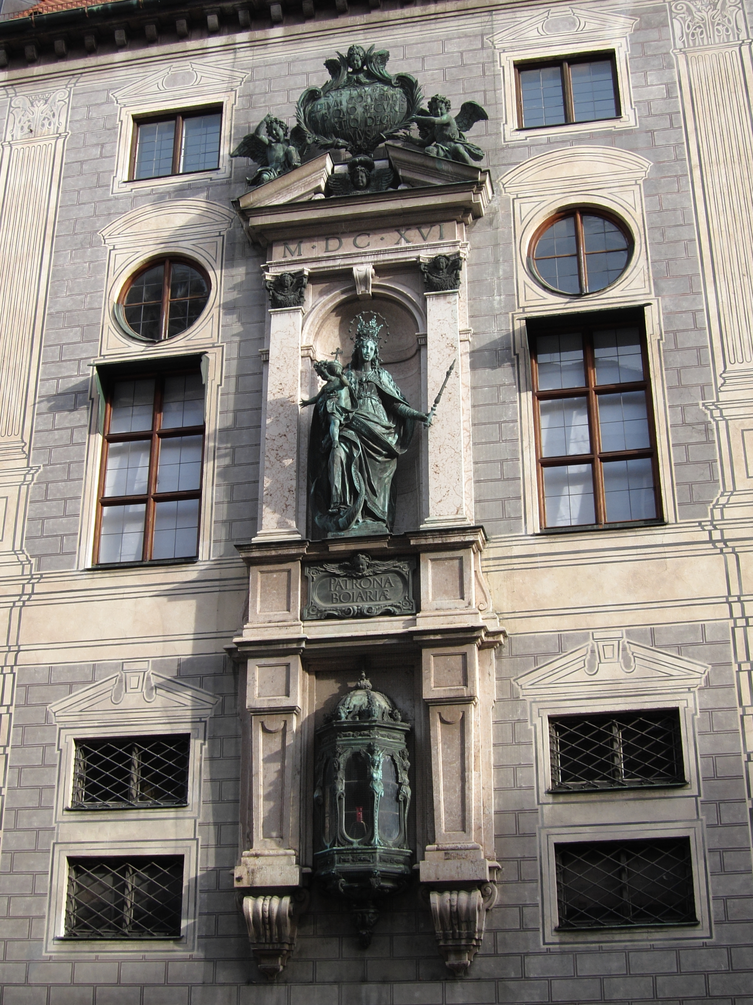 Residenzstraße; "Patrona Boiariae" an der Westfassade der Residenz; 1616; Inschrift im Medaillon an der Spitze: "Sub tuum praesidium confugimus, sub quo secure laetique degimus“ („Unter Deinen Schutz fliehen wir, in dem wir froh und sicher leben“); mit ewigem Licht in der Laterne zu ihren Füßen.